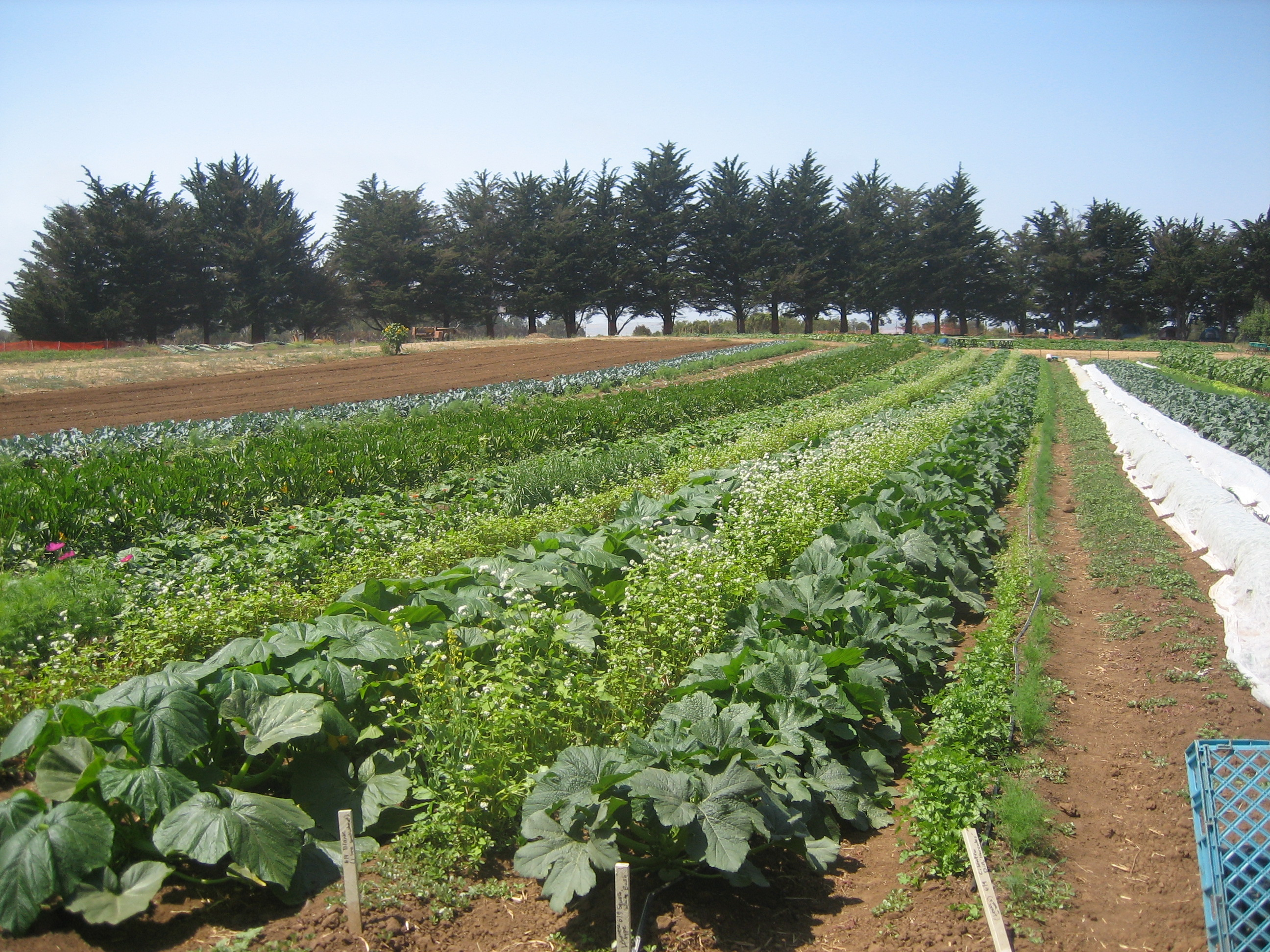 UCSC farm rows